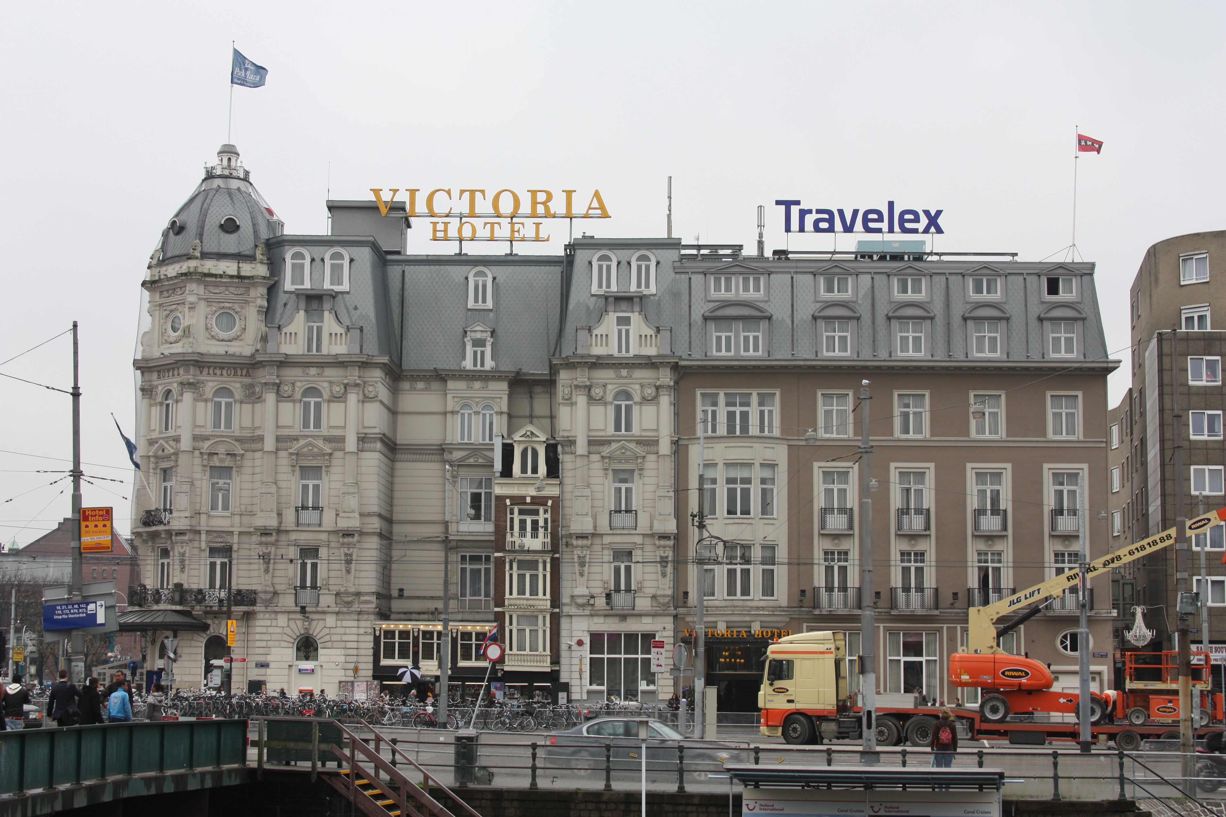 Amsterdam Zentrum